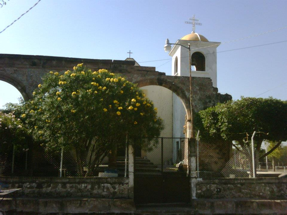 Iglesia Sagrado Corazon De Jesus